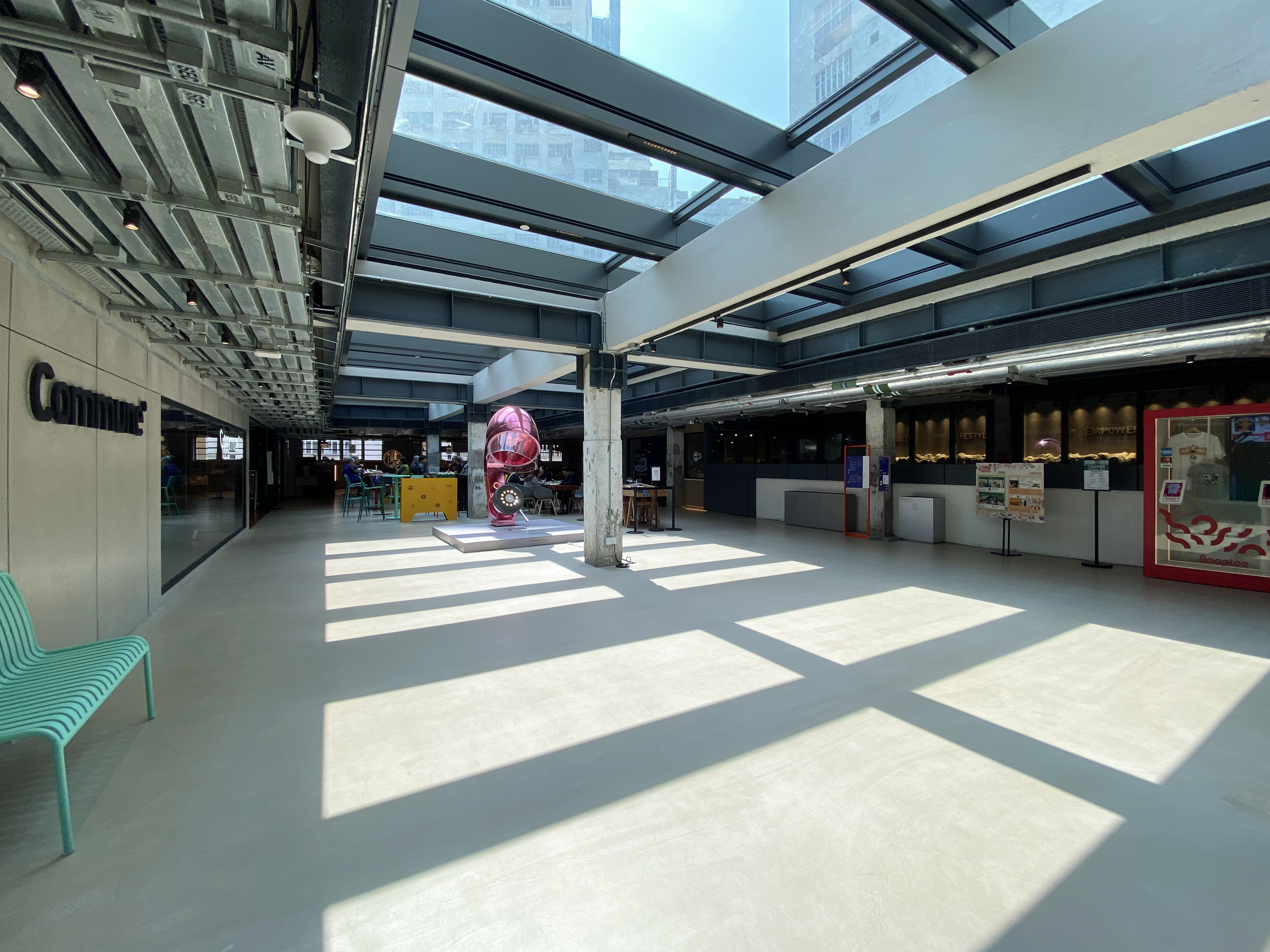 Mills 5 Level 1